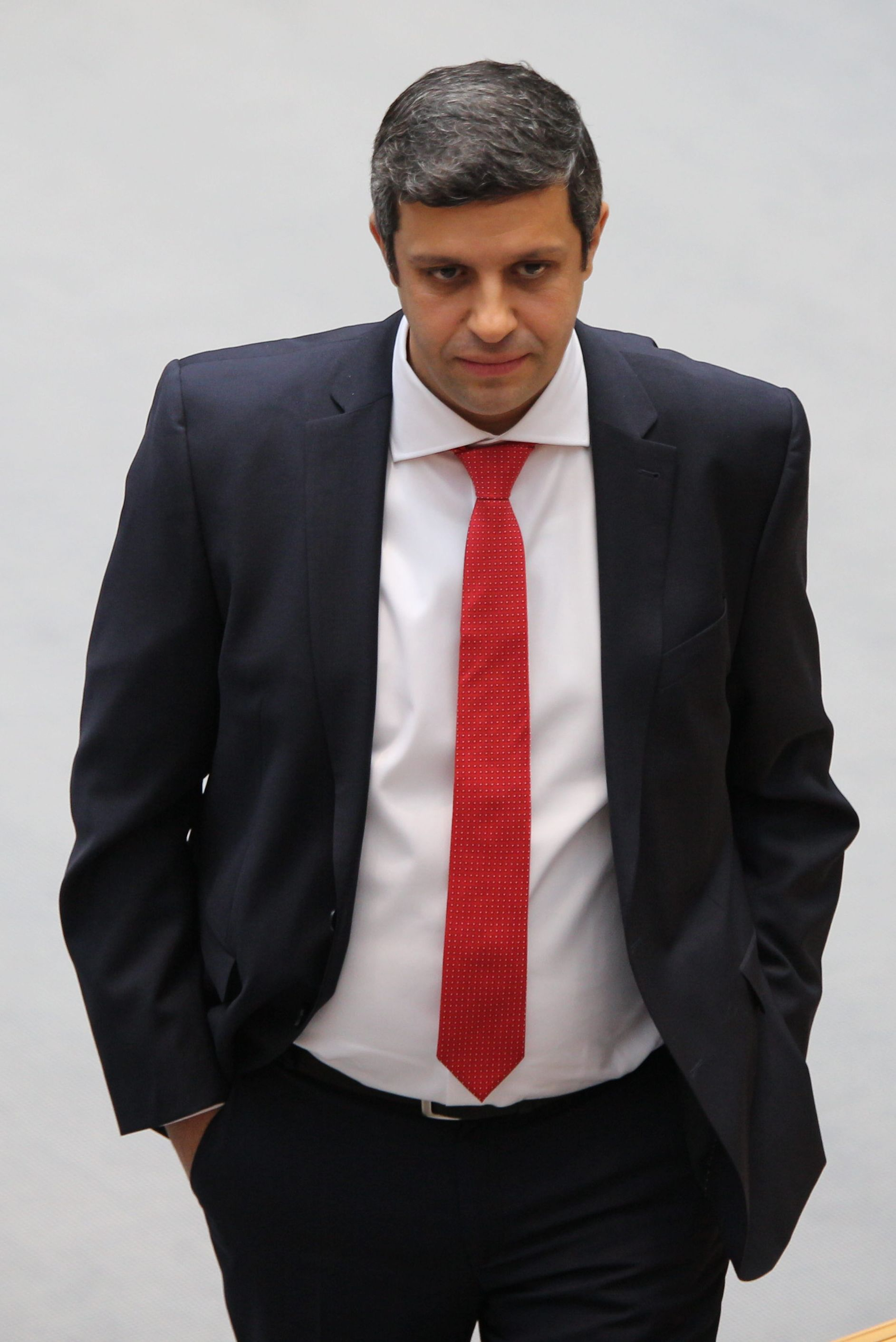 Raed Saleh (SPD) während der Plenarsitzung des Berliner Abgeordnetenhauses am 8. Dezember 2016